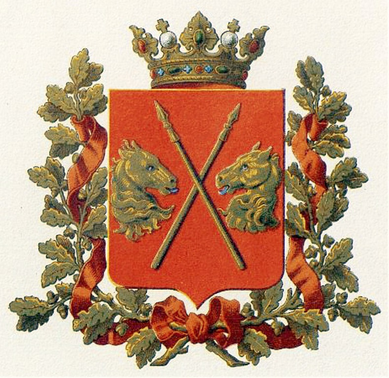 Official Russian Empire coat of arms Turgai Oblast. Герб Российской Империи Тургайской области в Гербовнике МВД. Утверждён Императором Всероссийским Александром Вторым в 1878 году.